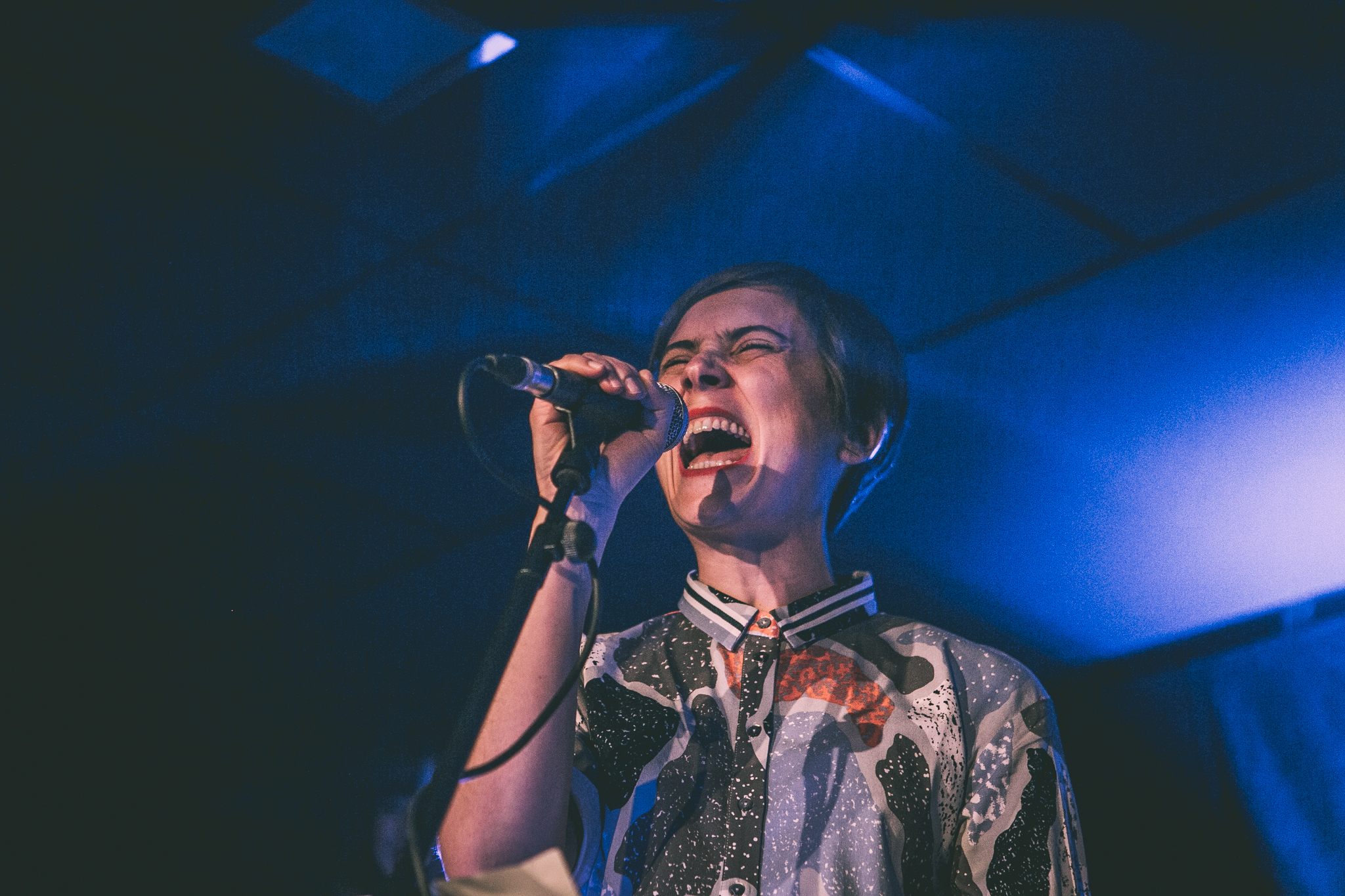 Mursego Dkluba kontzertua Intxaurrondo K.E.an. Argazkiak/fotos: Lorena Otero 2017/12/16